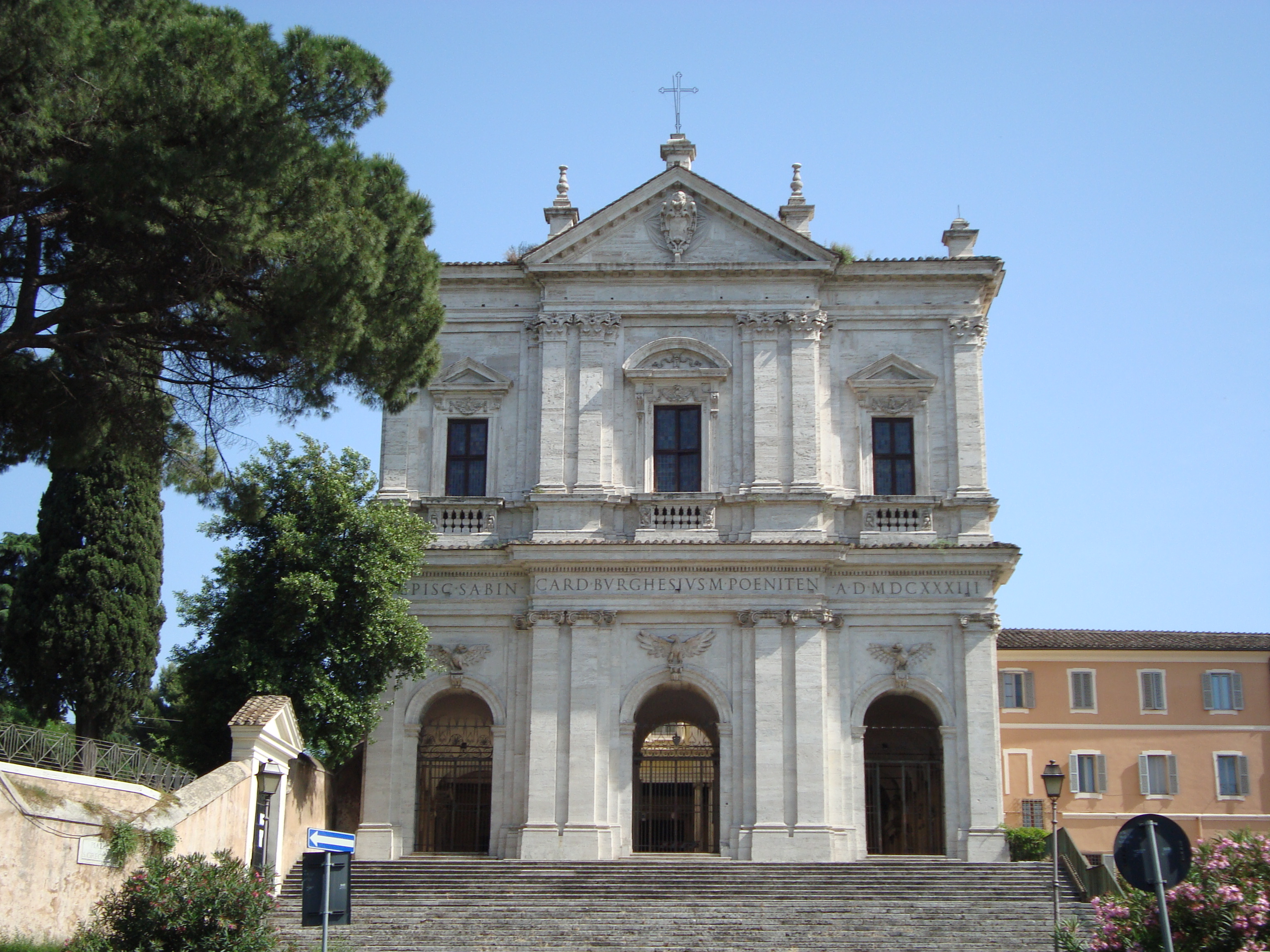 Eglise de San Gregorio al Celio, facade extérieure